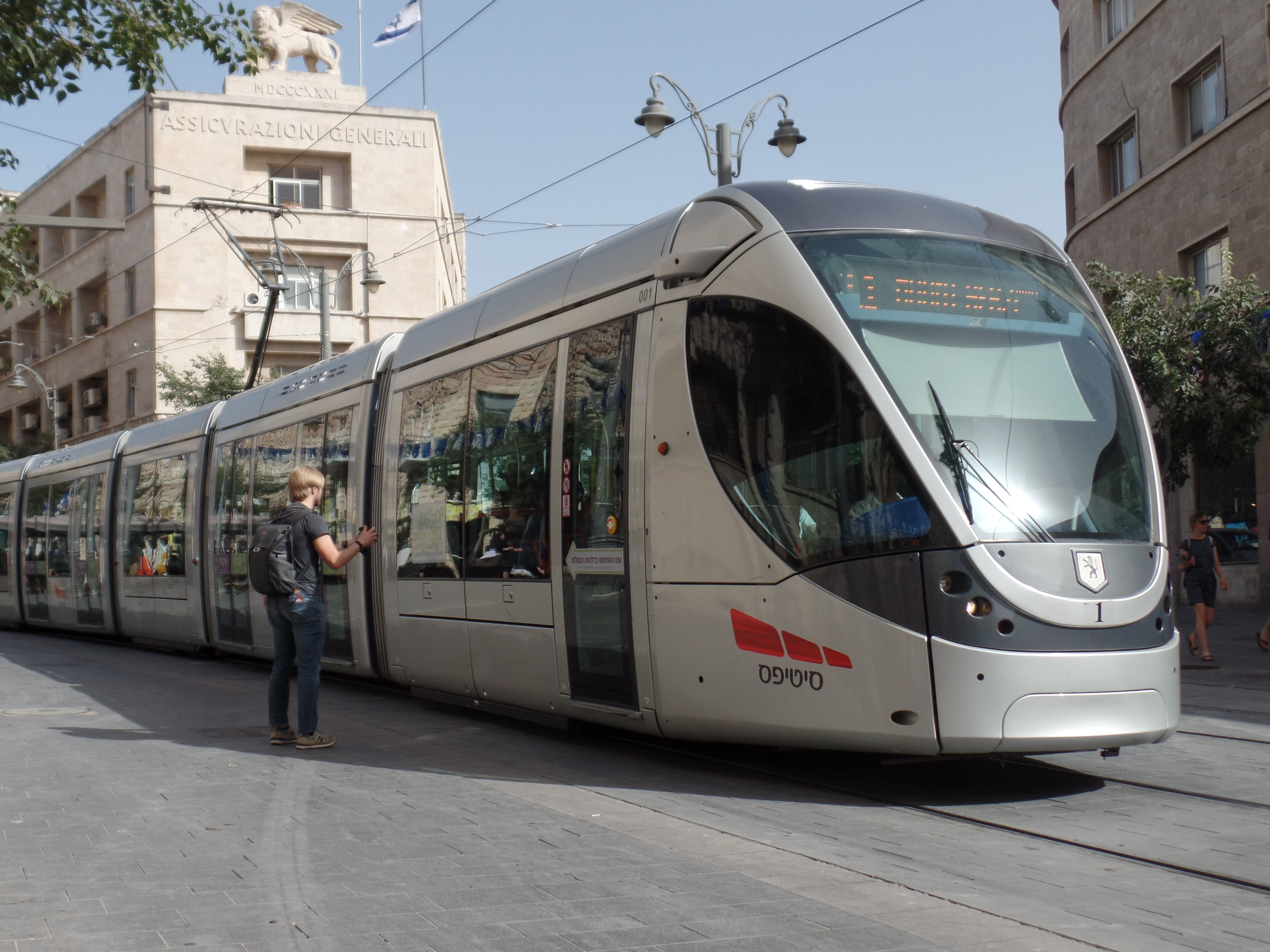 הרכבת הקלה ברחוב יפו בירושלים